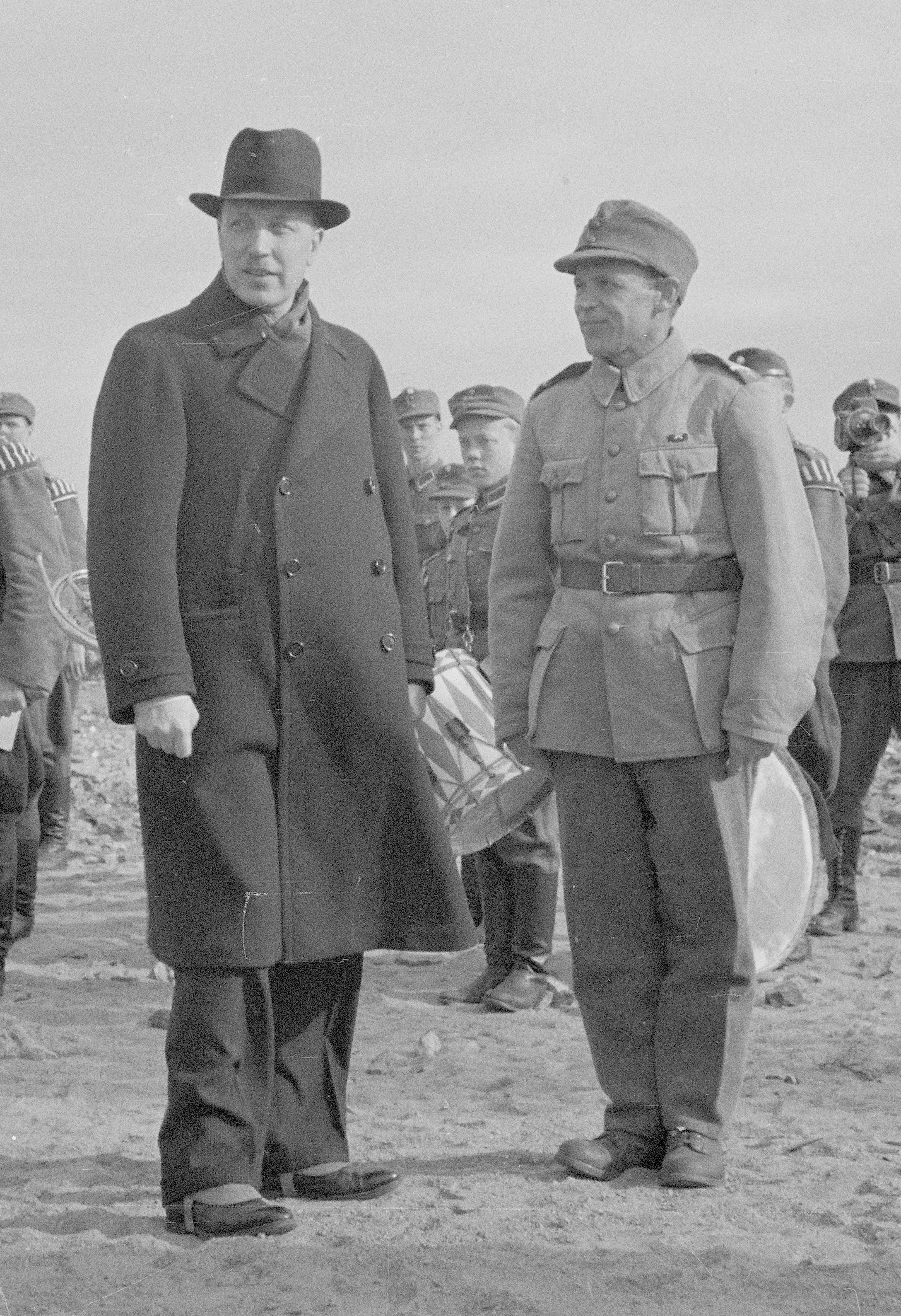 Presidentti Risto Ryti keskustelee kuvanveistäjä Arvi Tynyksen kanssa Mäkiluodossa Talvi- ja jatkosodan muistomerkin paljastustilaisuudessa Mäkiluodon linnakkeella syyskuussa 1941.